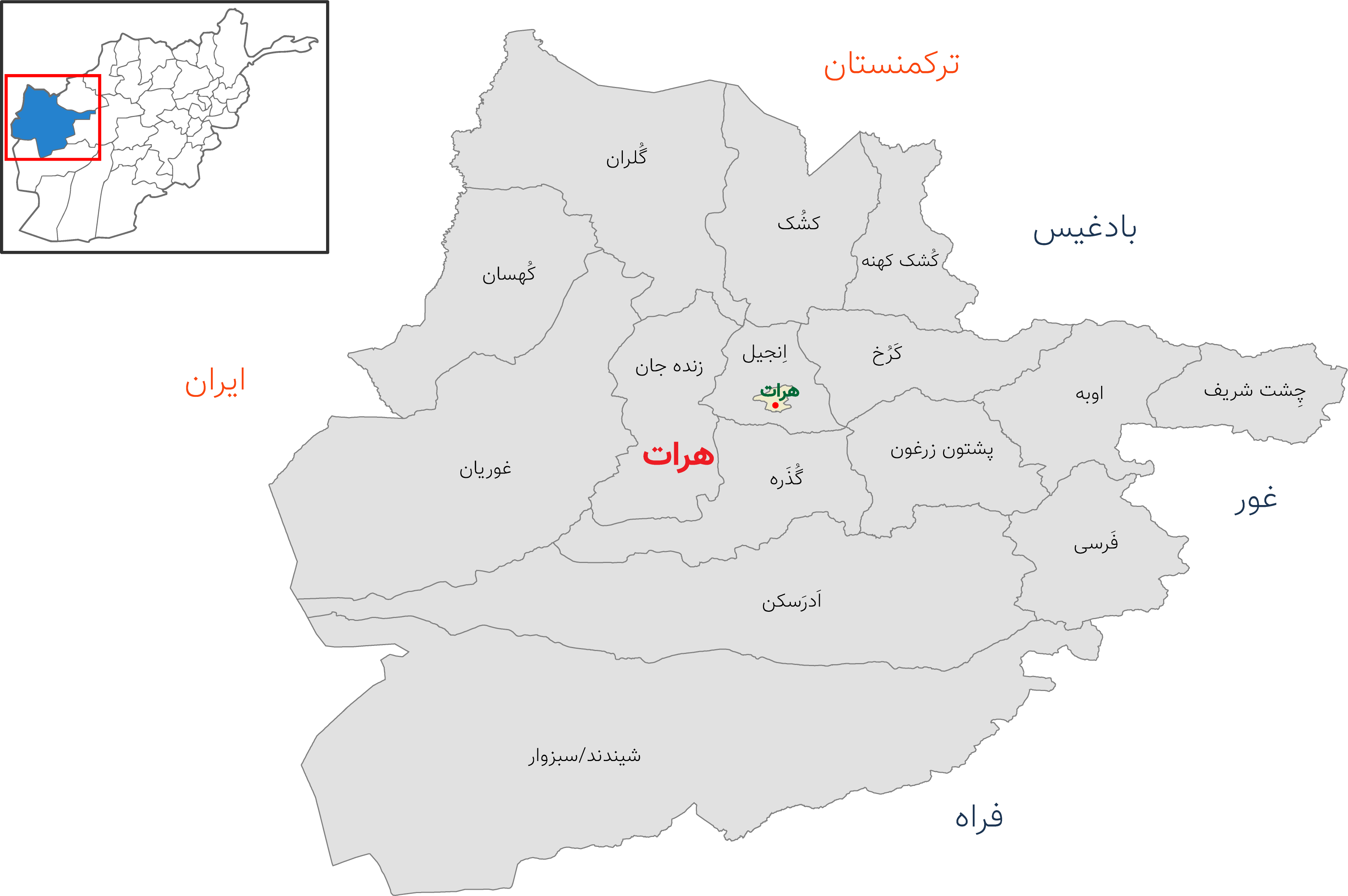 نقشه ولایت هرات